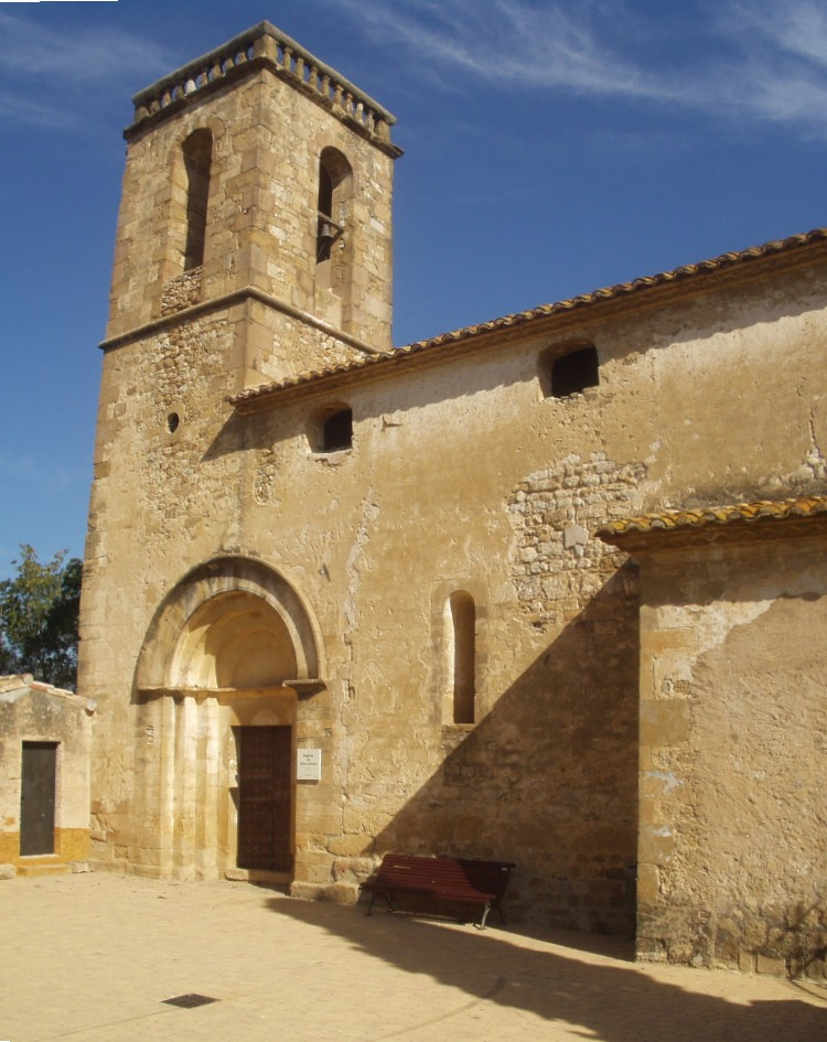 Església de Santa Coloma de Cabanelles